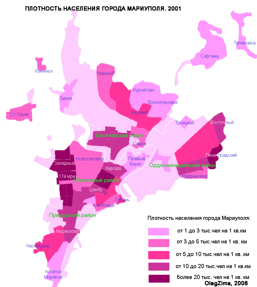 map